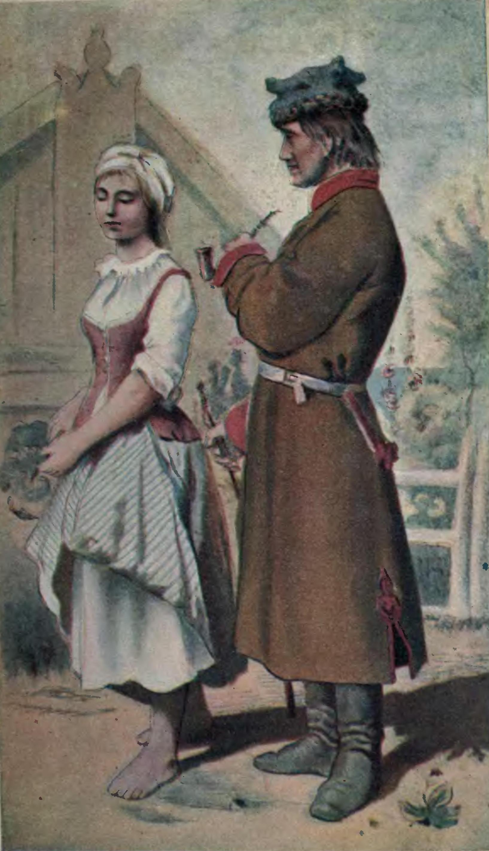 ilustracja do strony 15, tom 1 - włościanie spod Lubartowa, z obrazu Kolberga